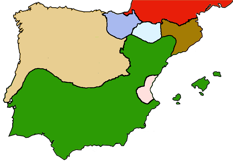 Mapa mut de la península ibèrica el 1100. Basat en [1]